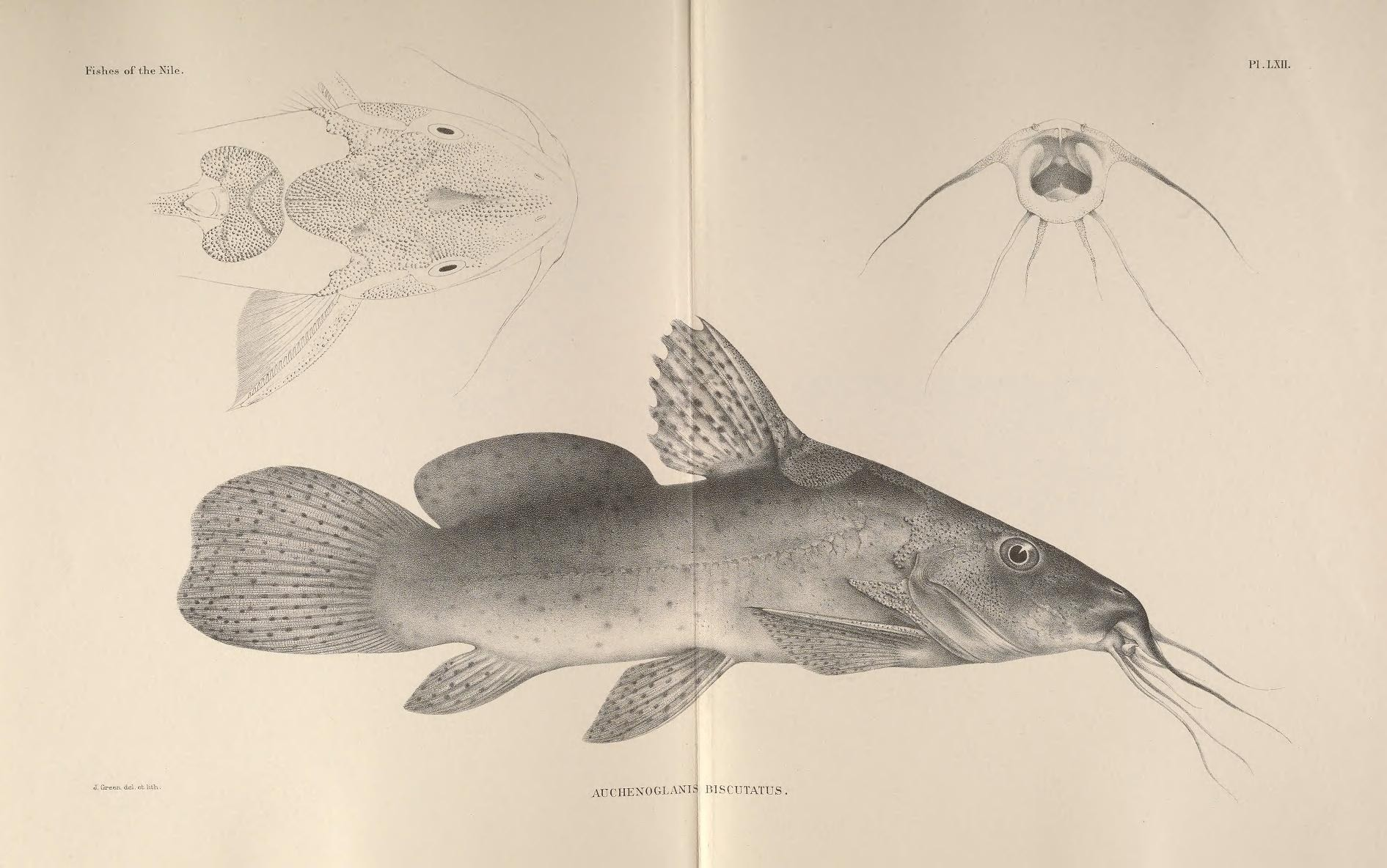 Auchenoglanis biscutatus